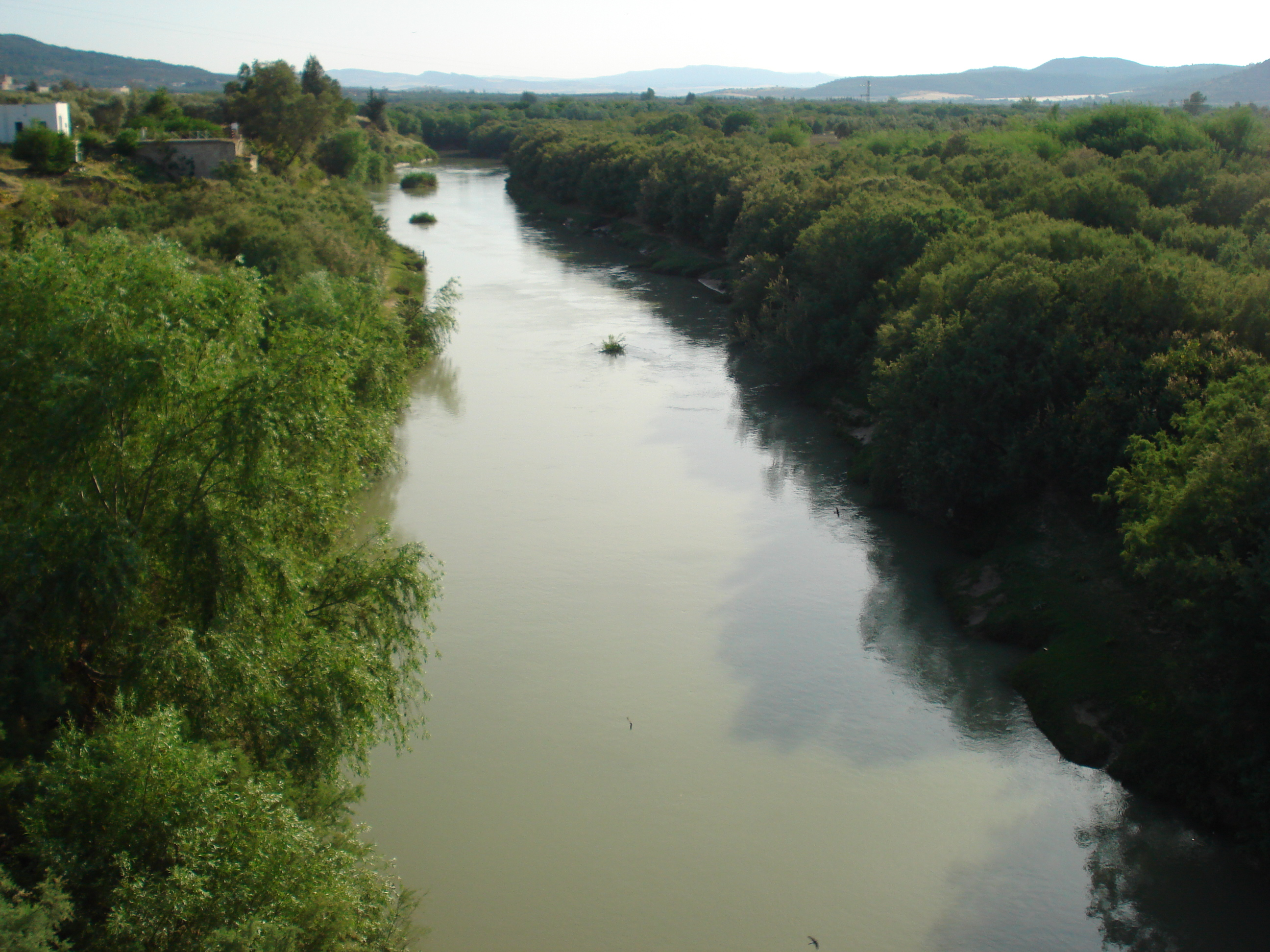 Oued Medjerda au niveau de la route nationale n°5 (RN 5) près de Slouguia